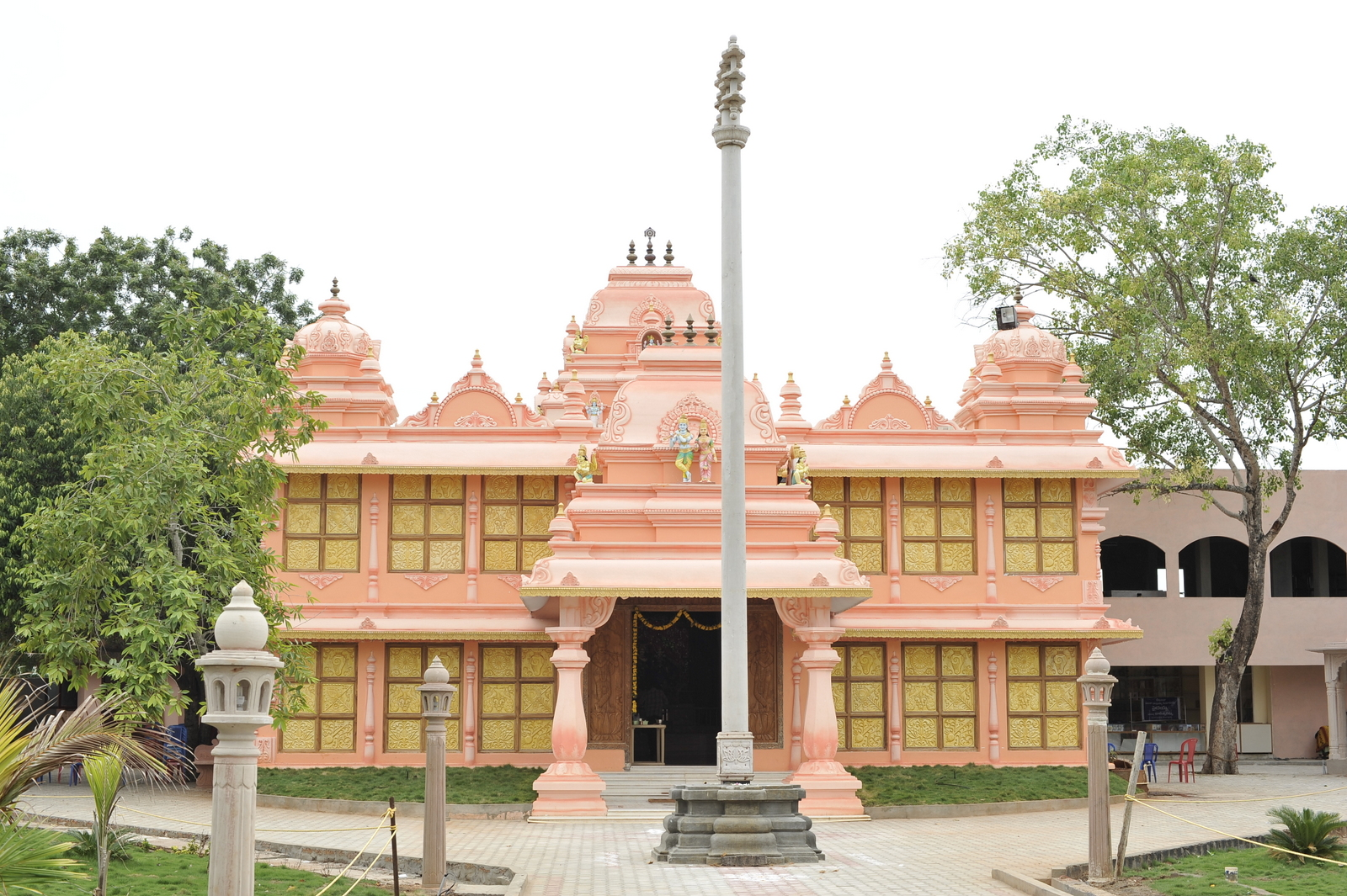 Аҧсшәа: Narasaraopet Iskcon Temple